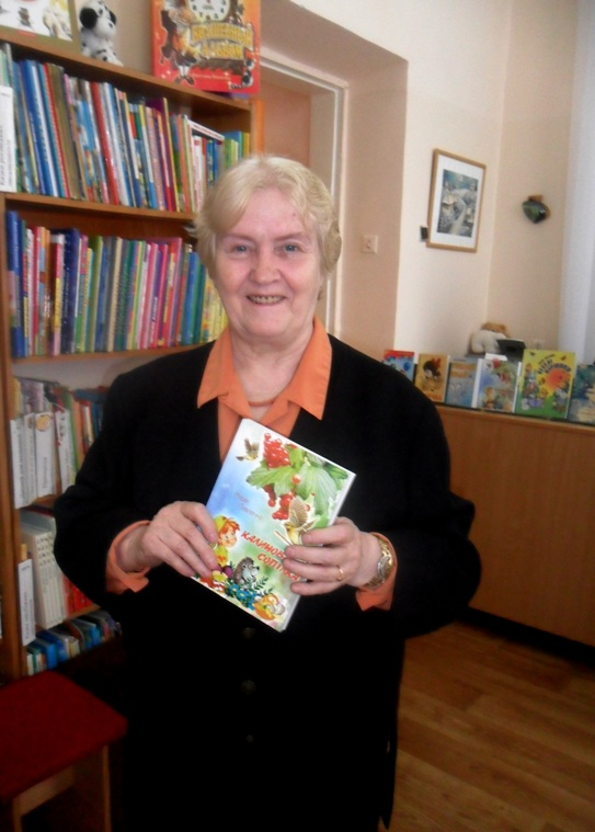 Павленко Марія Григорівна